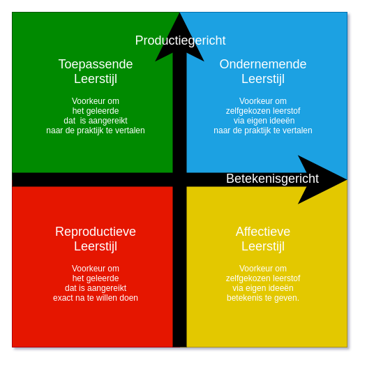 Een mogelijke manier om leerstijlen te categoriseren is te bepalen in welke mate de leren het geleerde zelf betekenis wenst te geven en/of wenst toe te passen in de praktijk.